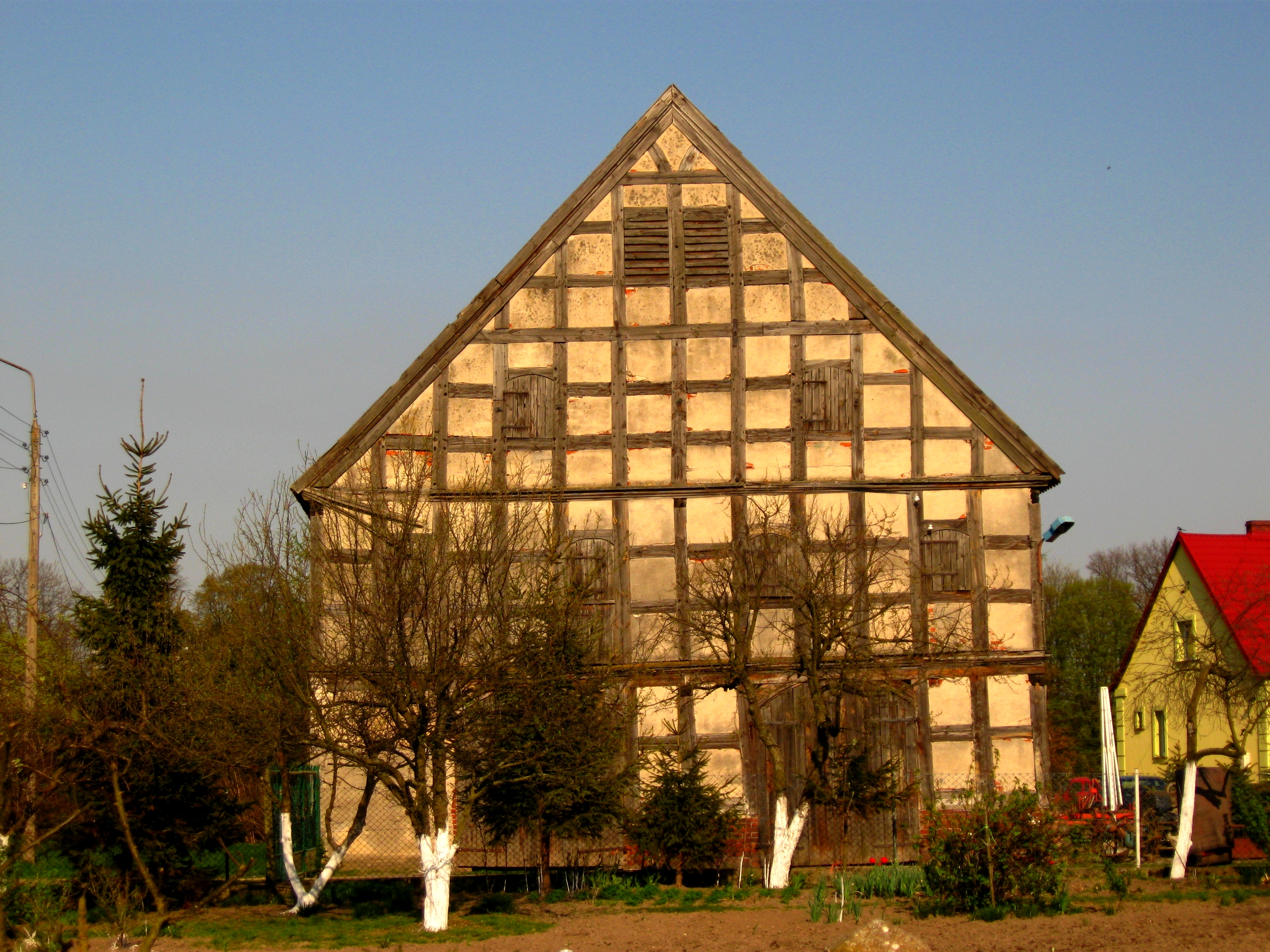 Spichlerz w Koźlinach (zabytek nr rejestr. A-335)